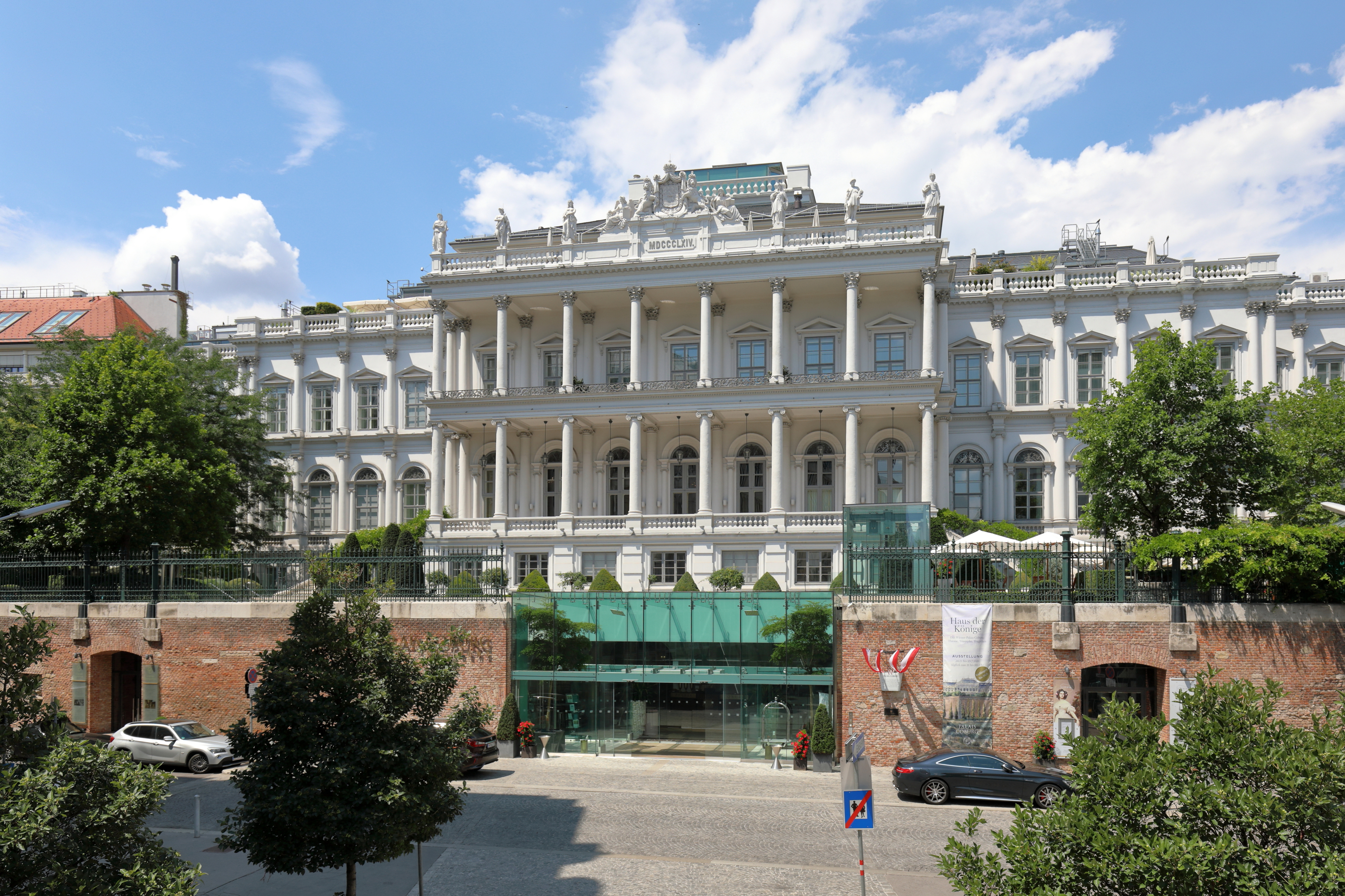 Südostansicht des Palais Coburg an der Adresse Coburgbastei 4 im 1. Wiener Gemeindebezirk Innere Stadt.Das Palais wurde im Auftrag von Ferdinand Georg August von Sachsen-Coburg-Saalfeld-Koháry in rund 5 Jahren Bauzeit ab 1840 errichtet. Im Zuge der Schleifung der Bastei wurde 1864 die Attikazone von Franz Neumann und Leopold Mayer neu gestaltet.